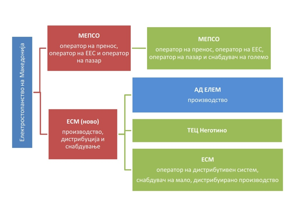 поделбата на Електростопанство на Македонија, ЕСМ